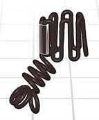 Unico dilatador nasal oculto